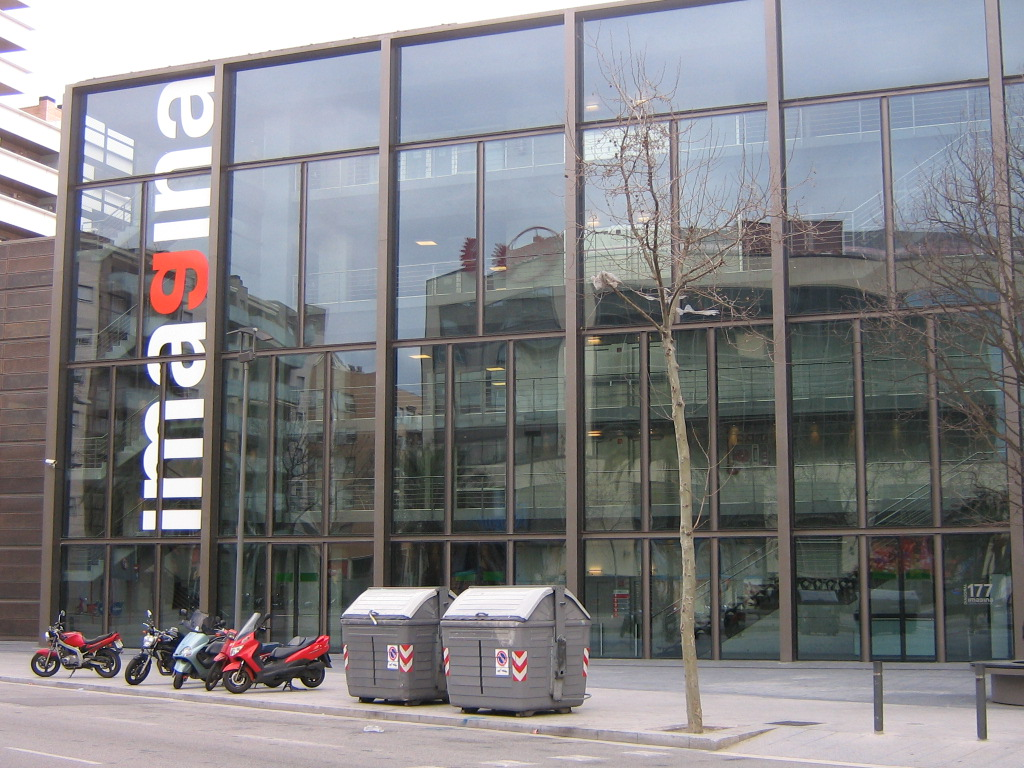 Centre Audiovisual Imagina, en el Distrito 22@ de Barcelona